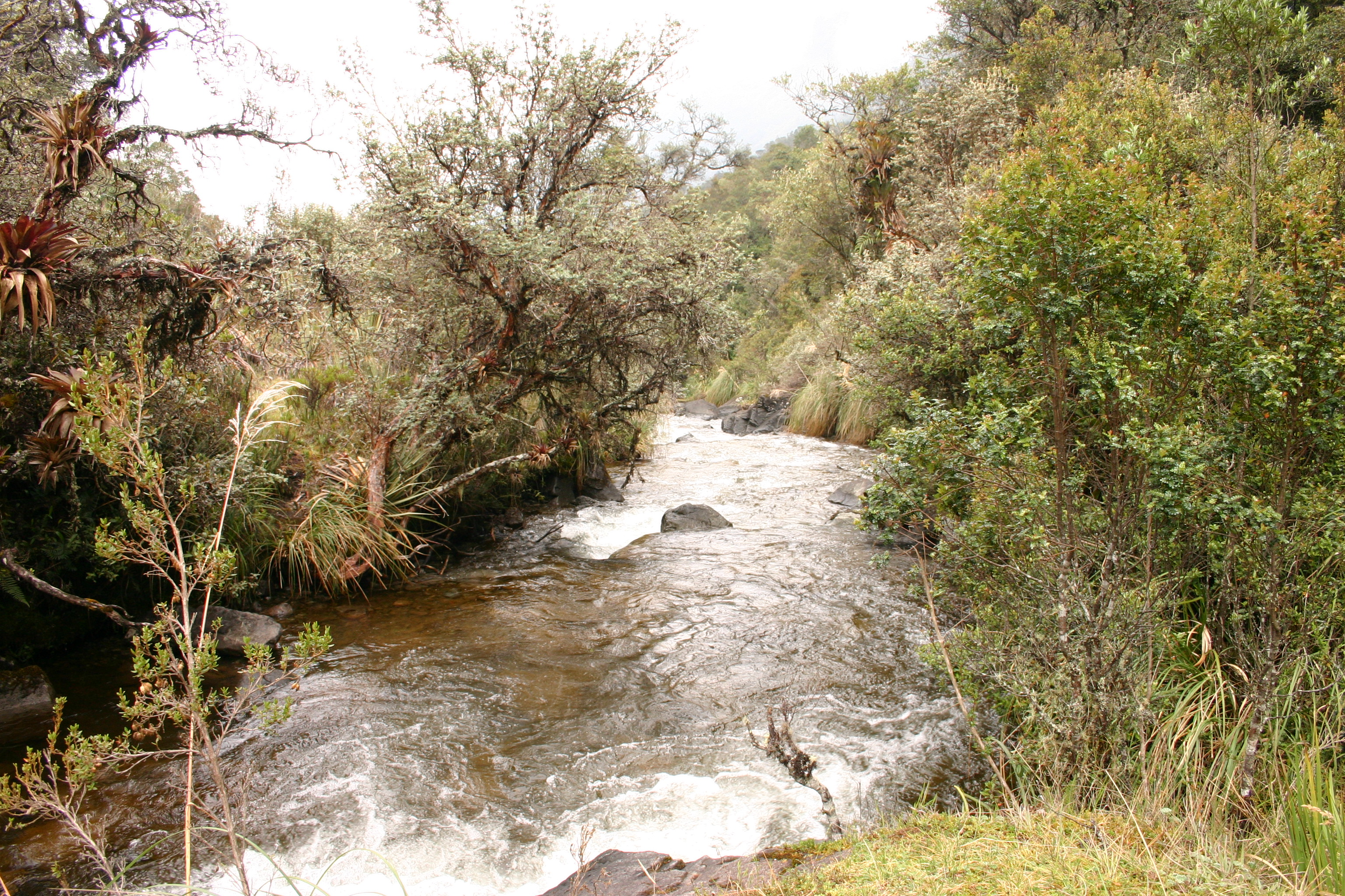 Eigen werk, Ecuador, oktober 2005